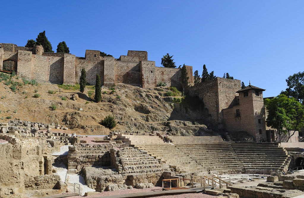 WikiLM_18